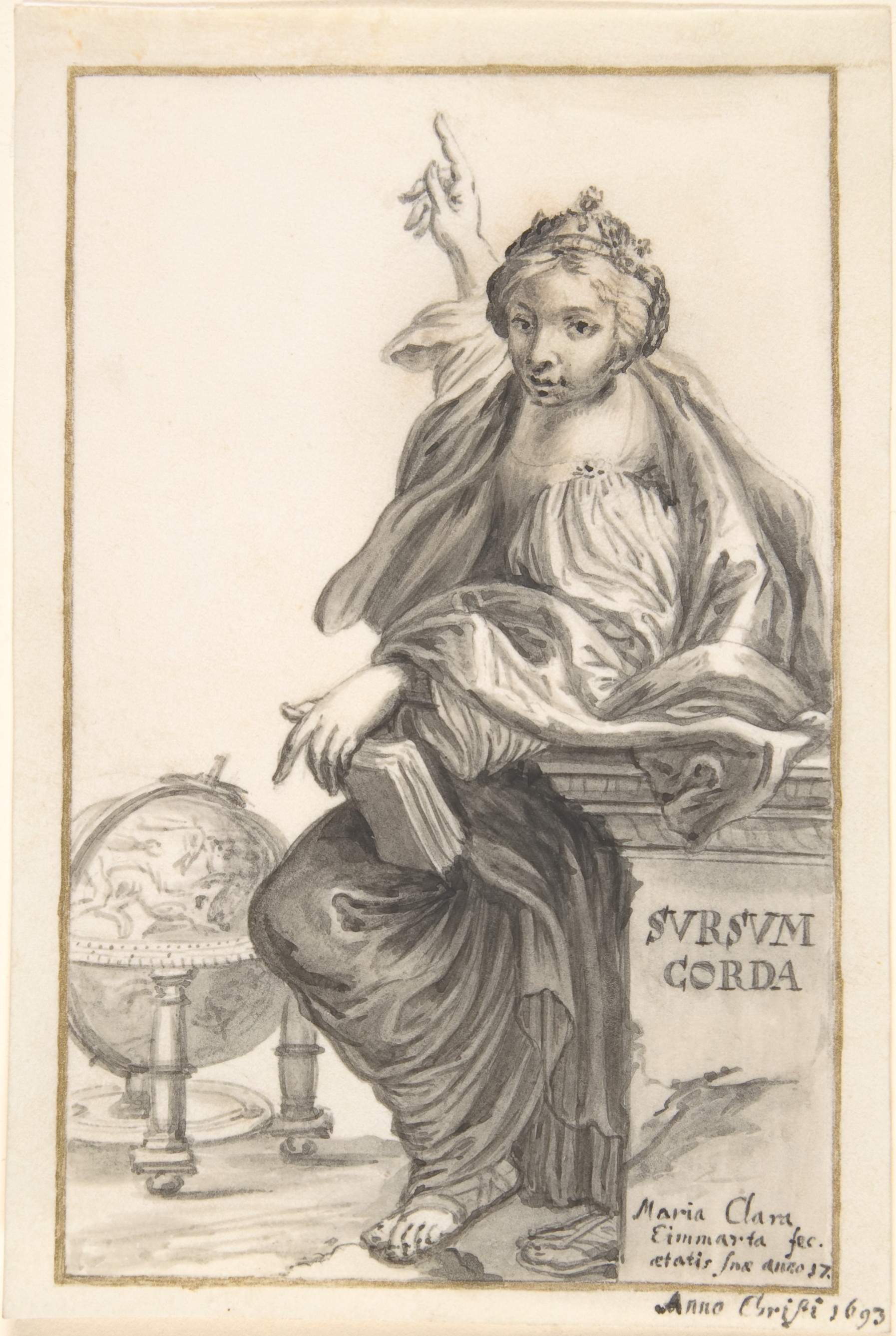 Drawing; Drawings